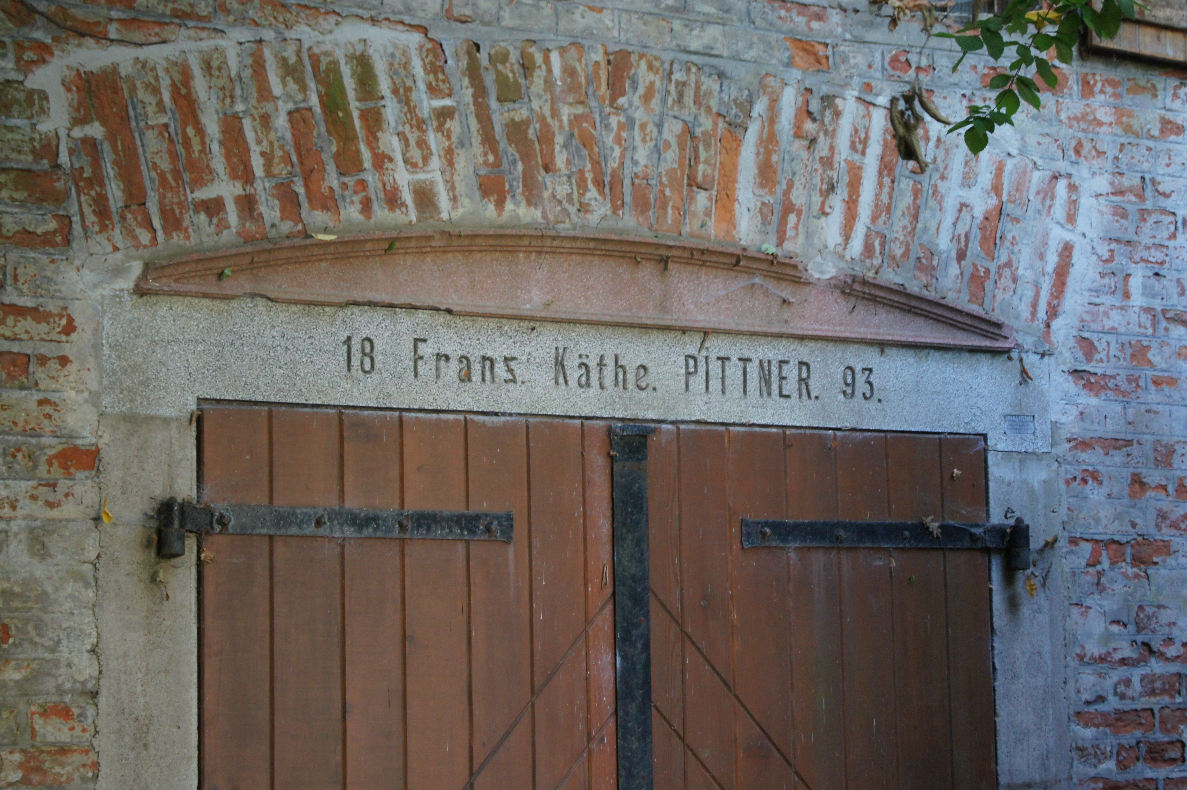 Finkensteinweg